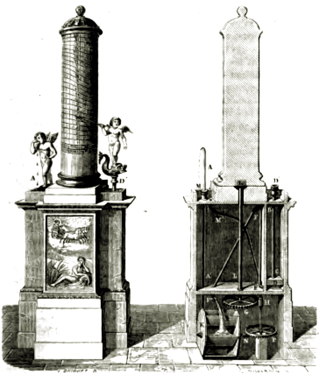 Fig. 16-17. — Clepsydre de Ctésibius restituée par Perrault. Coupe de la clepsydre de Ctésibius.